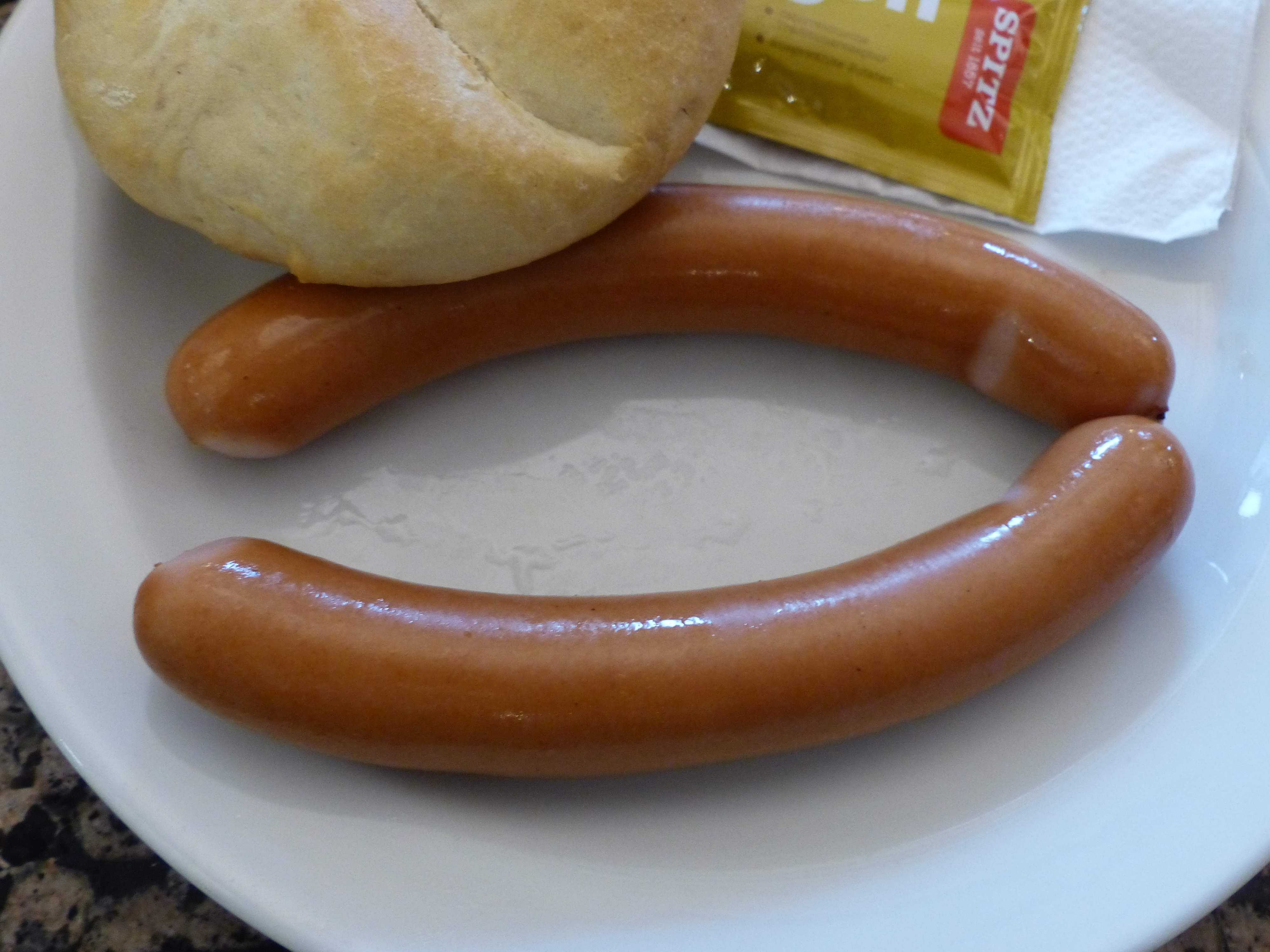 Frankfurter Würstchen, im Joules Bistro des Technischen Museums Wien